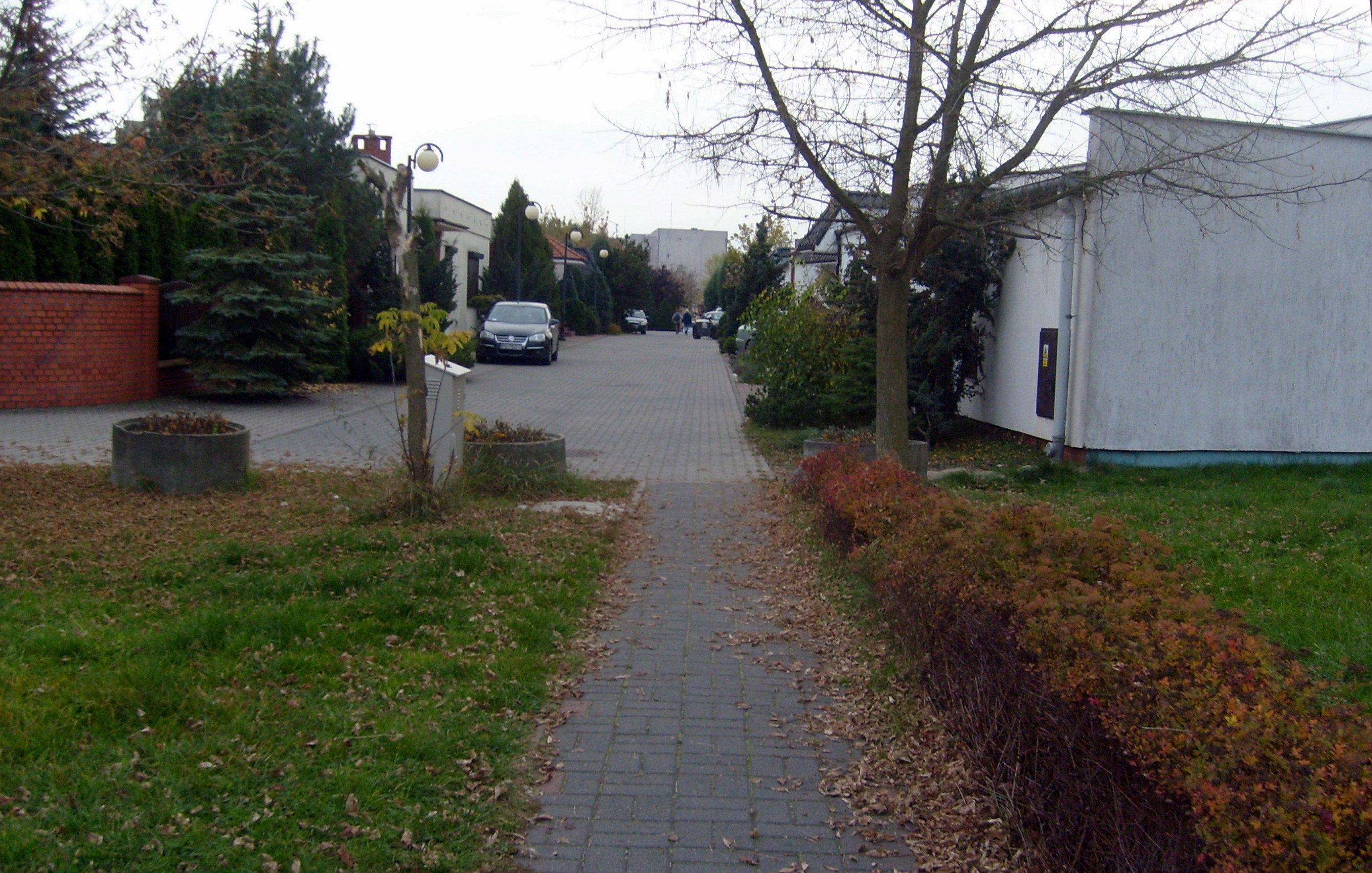 Osiedle Zodiak; Poznań